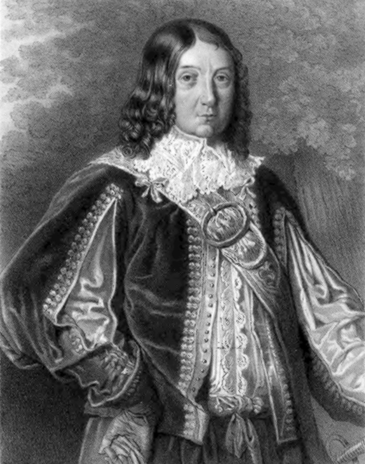 Беларуская (тарашкевіца): Міхал Казімер Радзівіл, падканцлер і гетман польны літоўскі